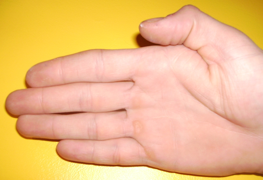 Hand zur Stifneckabmessung